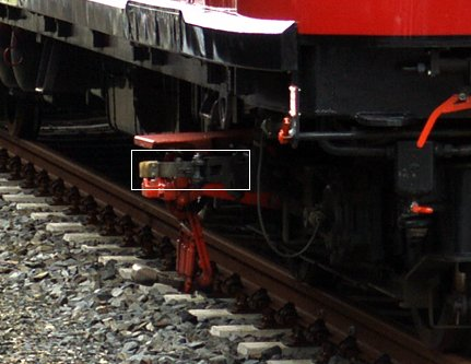 Baureihe ET 167 - Auslösehebel Fahrsperre